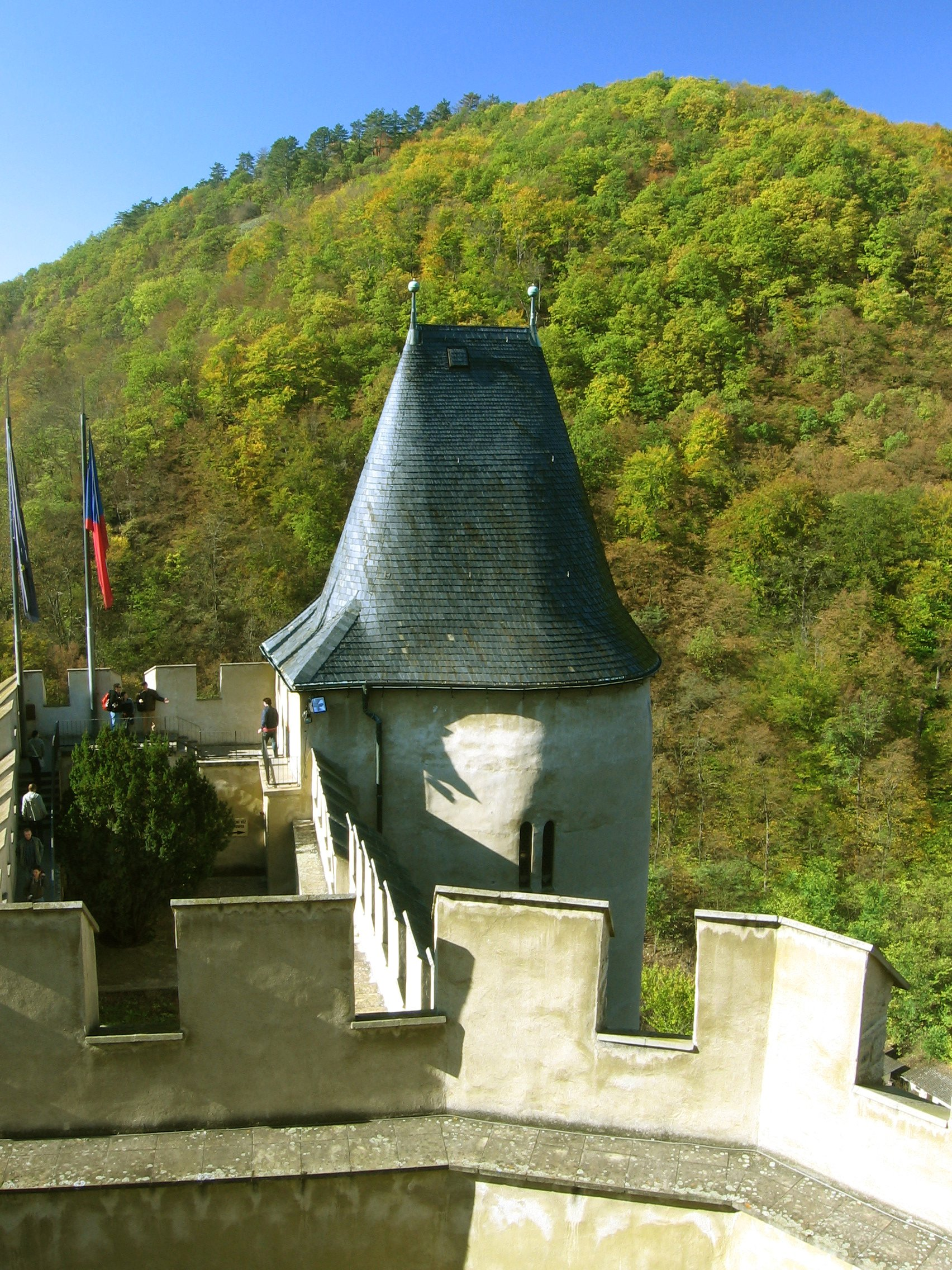 Karluv hrad, studniční věž